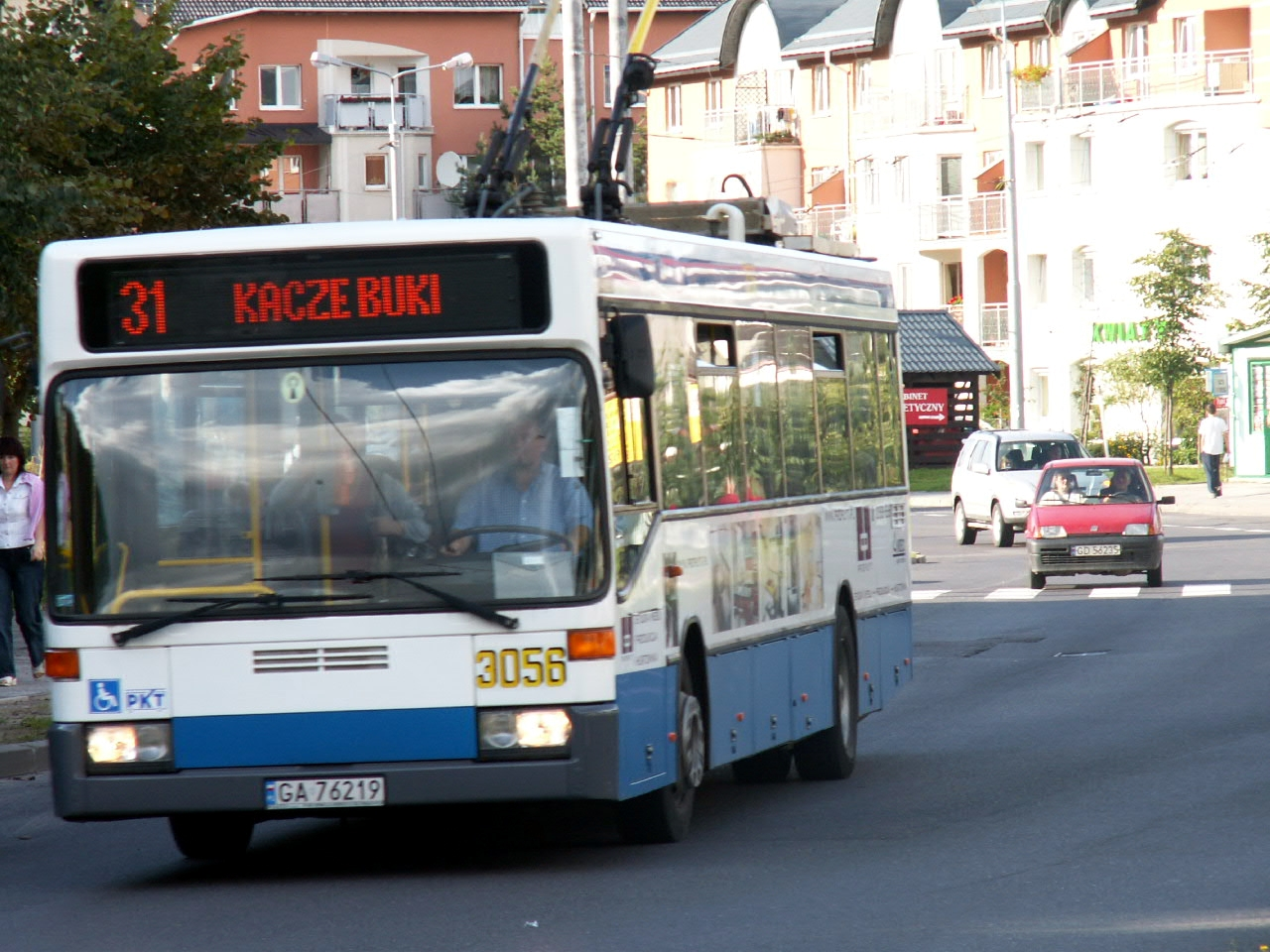 Trolejbus linii 31 przed przystankiem Kameliowa - kierunek Kacze Buki; nr boczny: 3056. Mercedes-Benz O 405 NE z 1994 roku.